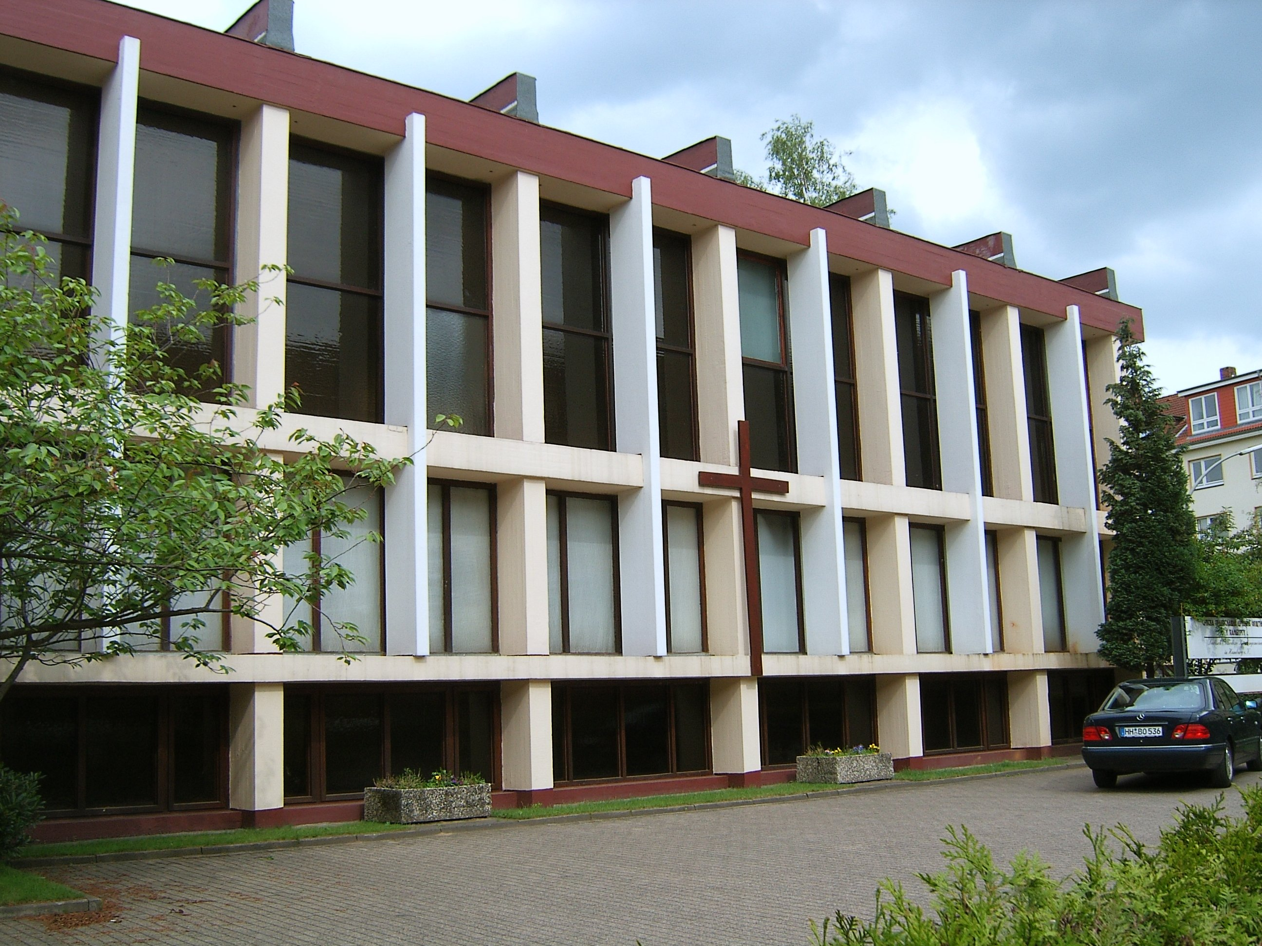 Hamburg, Eilbek, Serbisch orthodoxe Kirche "KIRCHE DES SINAXYSERZENGELs MICHAEL"